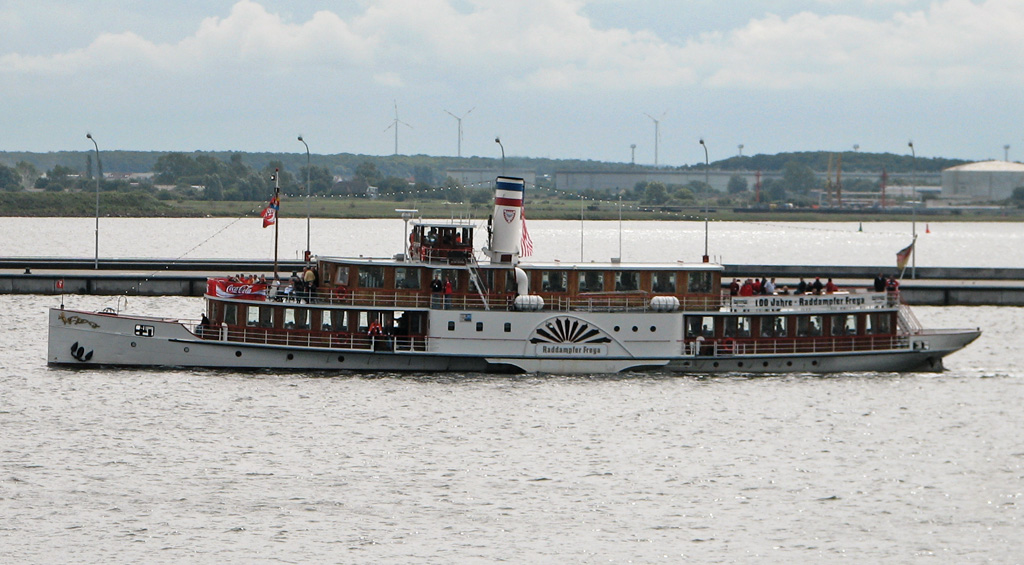 Raddampfer Freya auf der Hanse Sail 2005